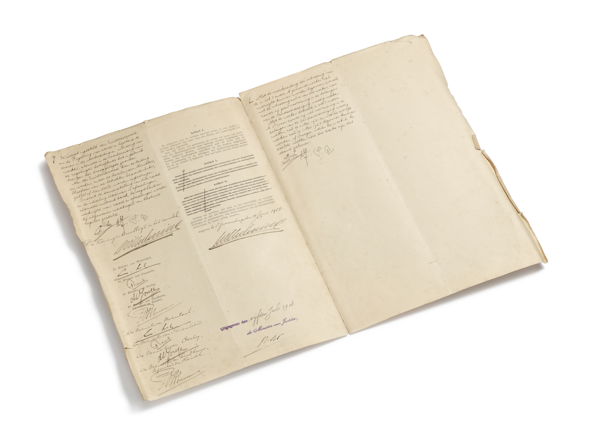 Wet gedeeltelijke drooglegging Zuiderzee KdK, 1898-1945, inventarisnummer 6364